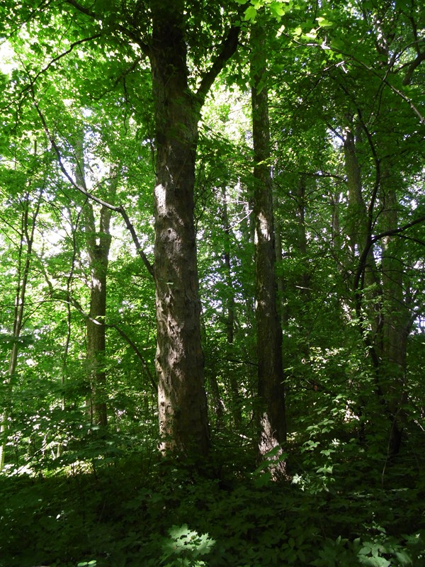 STARY DRZEWOSTAN W ZABYTKOWYM PARKU.